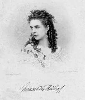 Lithographie